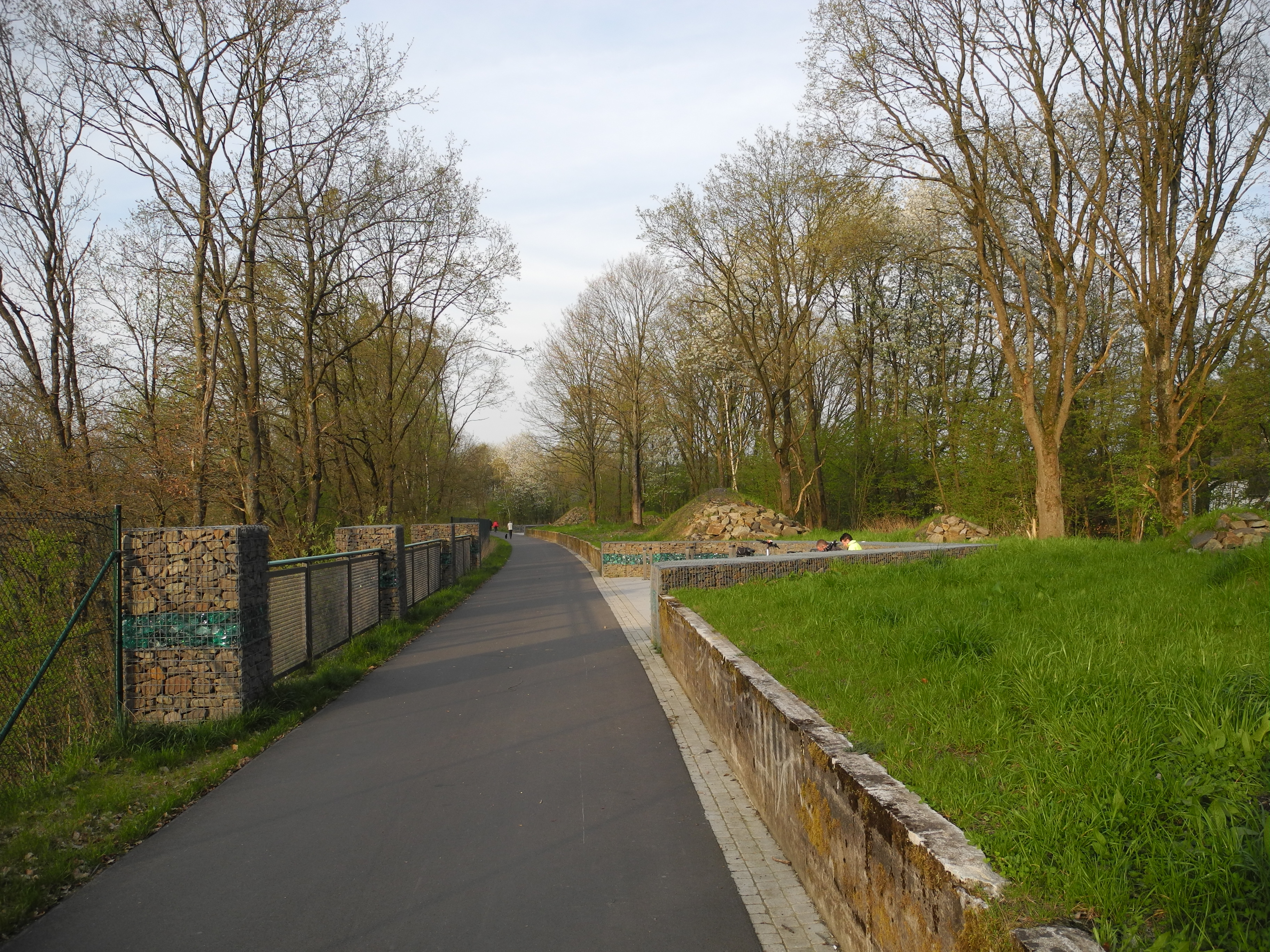 Wetter-Wengern, Elbschetal-Radweg am ehemaligen Bahnhalt Wengern-West, Blickrichtung Nordosten. Am rechten Wegrand ist noch der orginale Bahnsteigsockel zu erkennen, in den mehrere Rastareale eingeschnitten wurden.